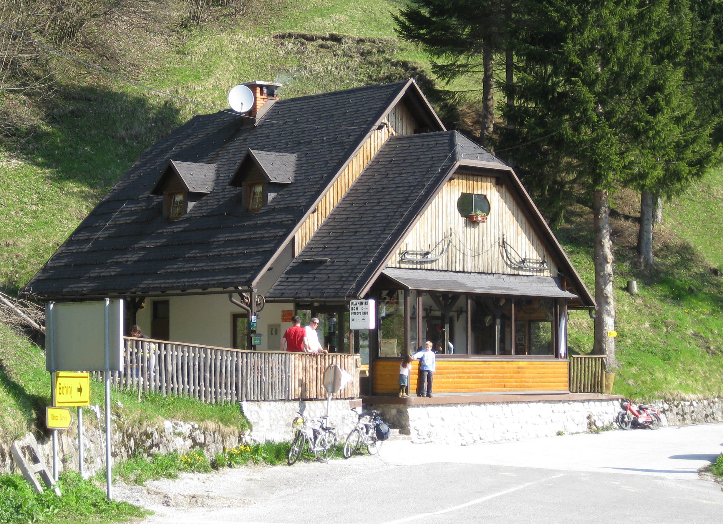 Alpine hut at Petrovo Brdo, Slovenia